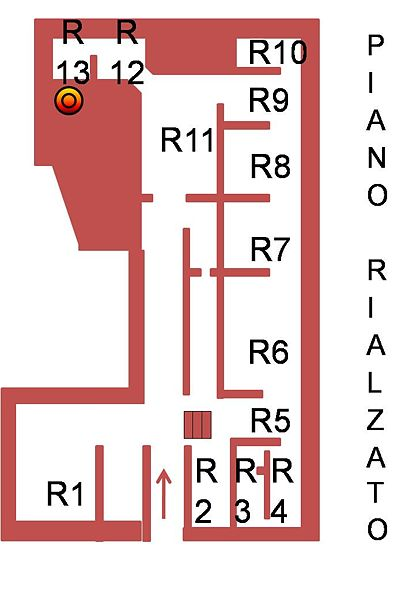 Pianta del piano rialzato di palazzo Farnese a Piacenza